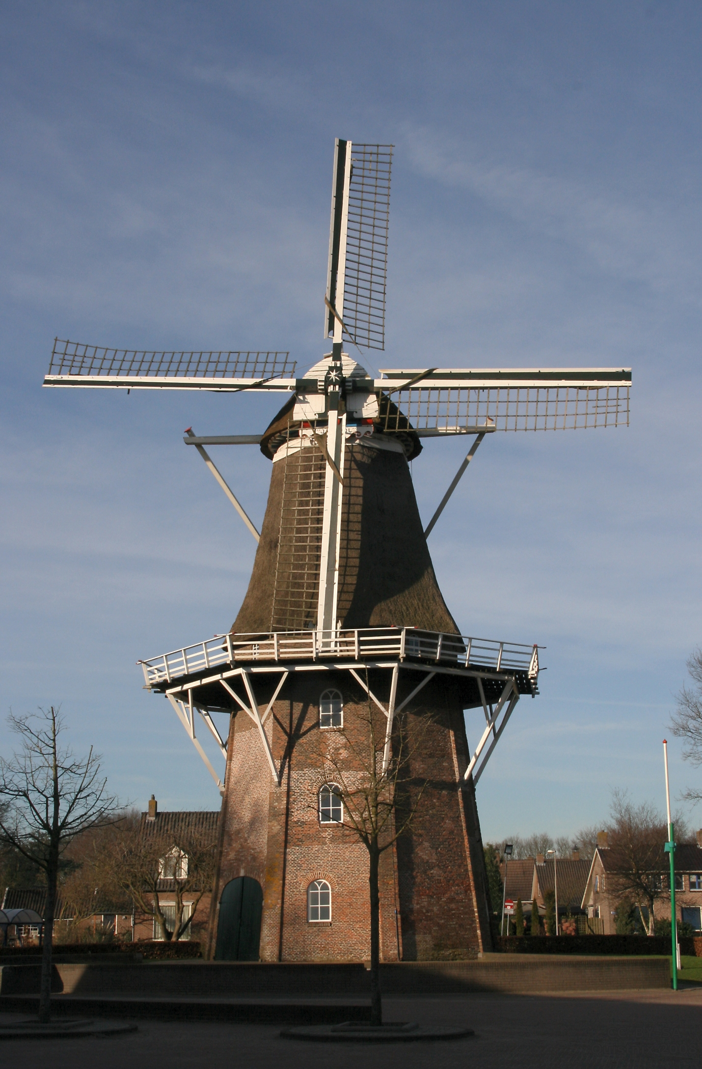 Dalen: windmolen Jan Pol